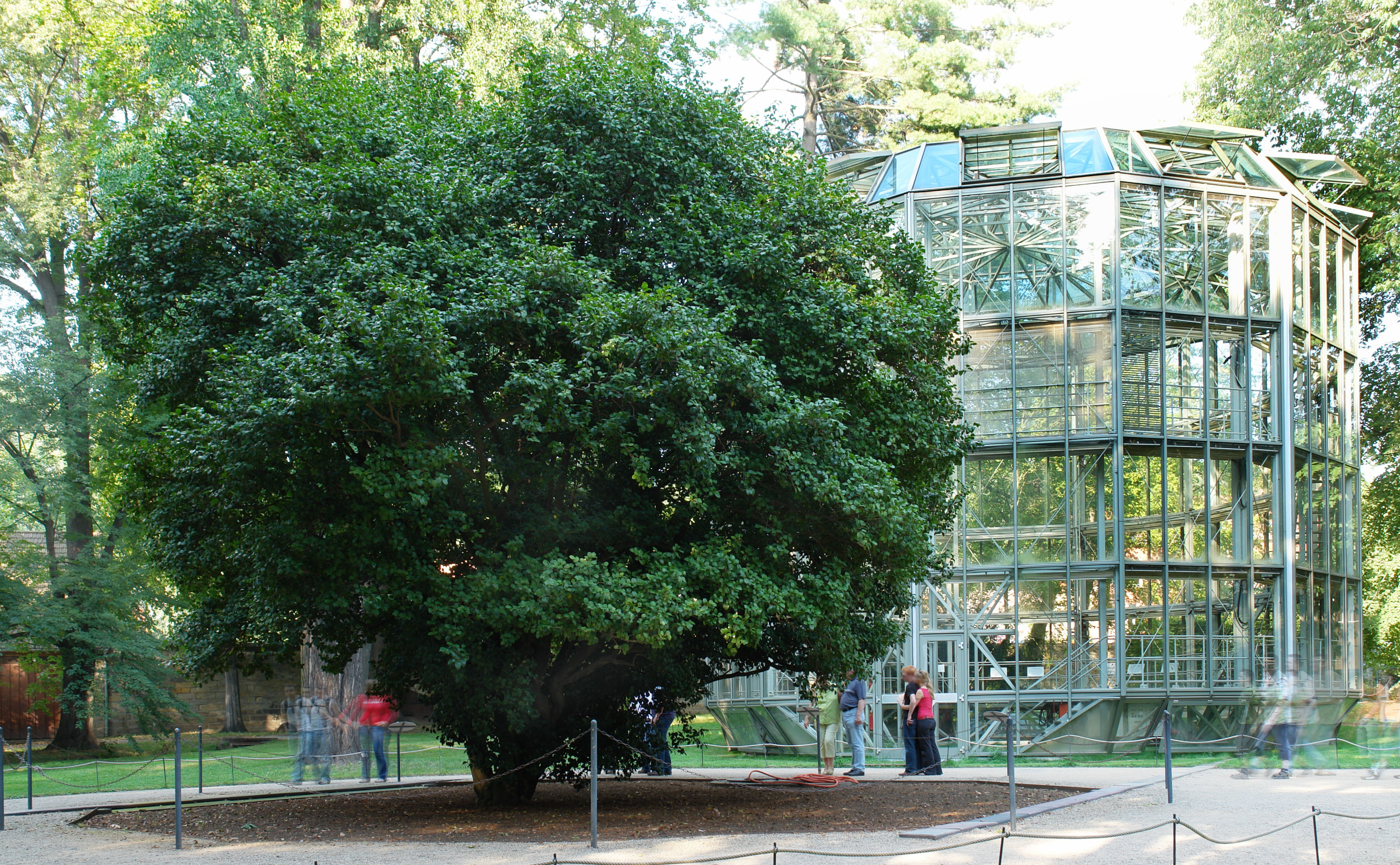 Kamelienhaus Pillnitz